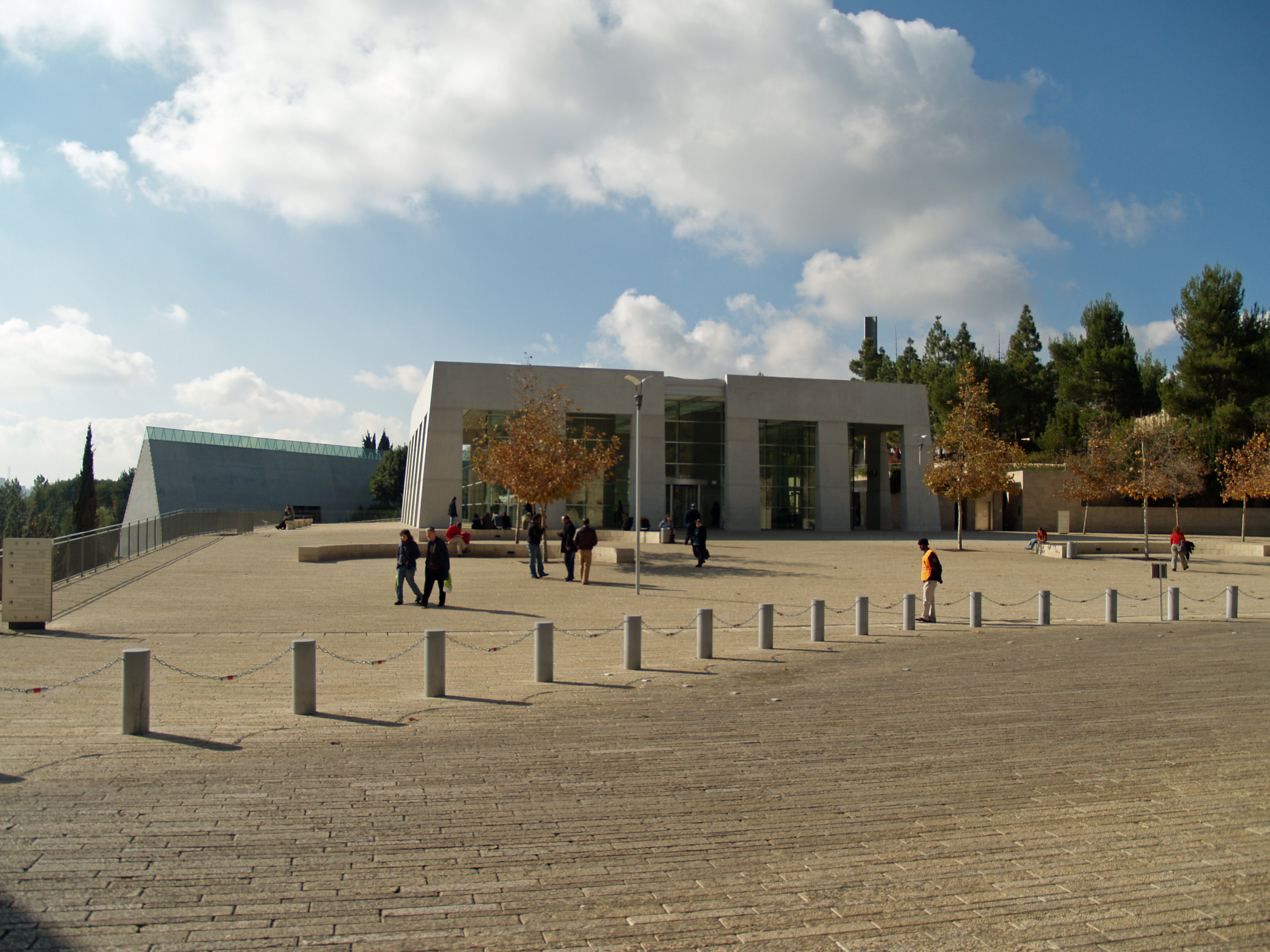 Yad Vashem museum exterior.